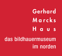 Das Logo des Gerhard-Marcks-Hauses, eines Museums für moderne und zeitgenössische Bildhauerei in Bremen.